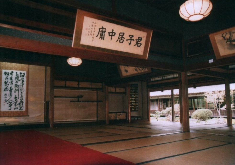 北方文化博物館となっている伊藤邸の大広間。